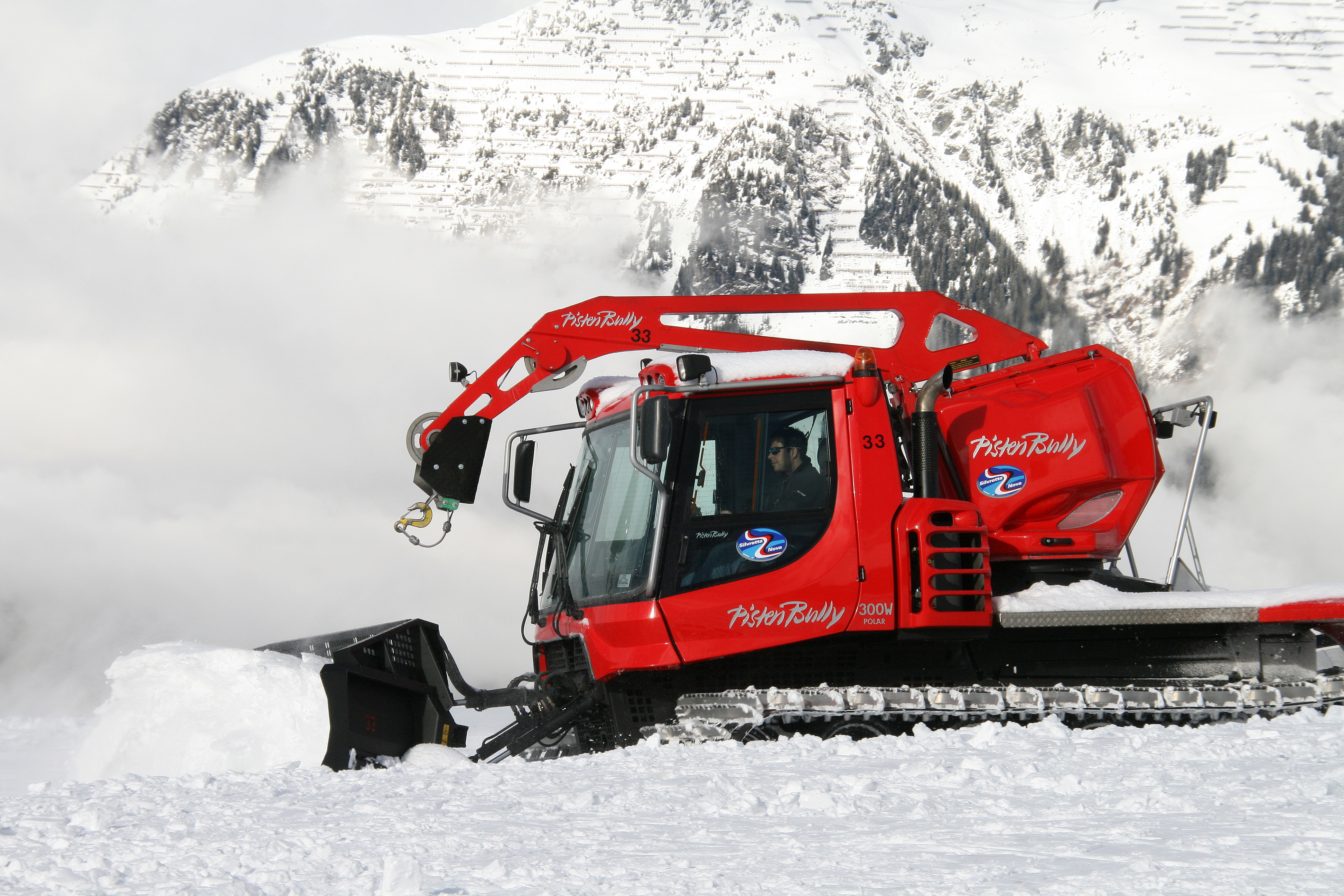 Pistenraupe, hier ein Kässbohrer Typ: “Pisten Bully 300W” zur Arbeit auf der Bergstation der Versettlabahn im Montafoner Skigebiet der Silvretta in Vorarlberg. Im Hintergrund Lawinenfangzäune unterhalb der Berge Grappeskopf-2206m und Zapfkopf-2290m im Gemeindegebiet Gortipohl.